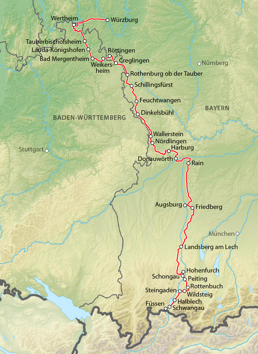 Verlauf der Romantischen Straße 2016